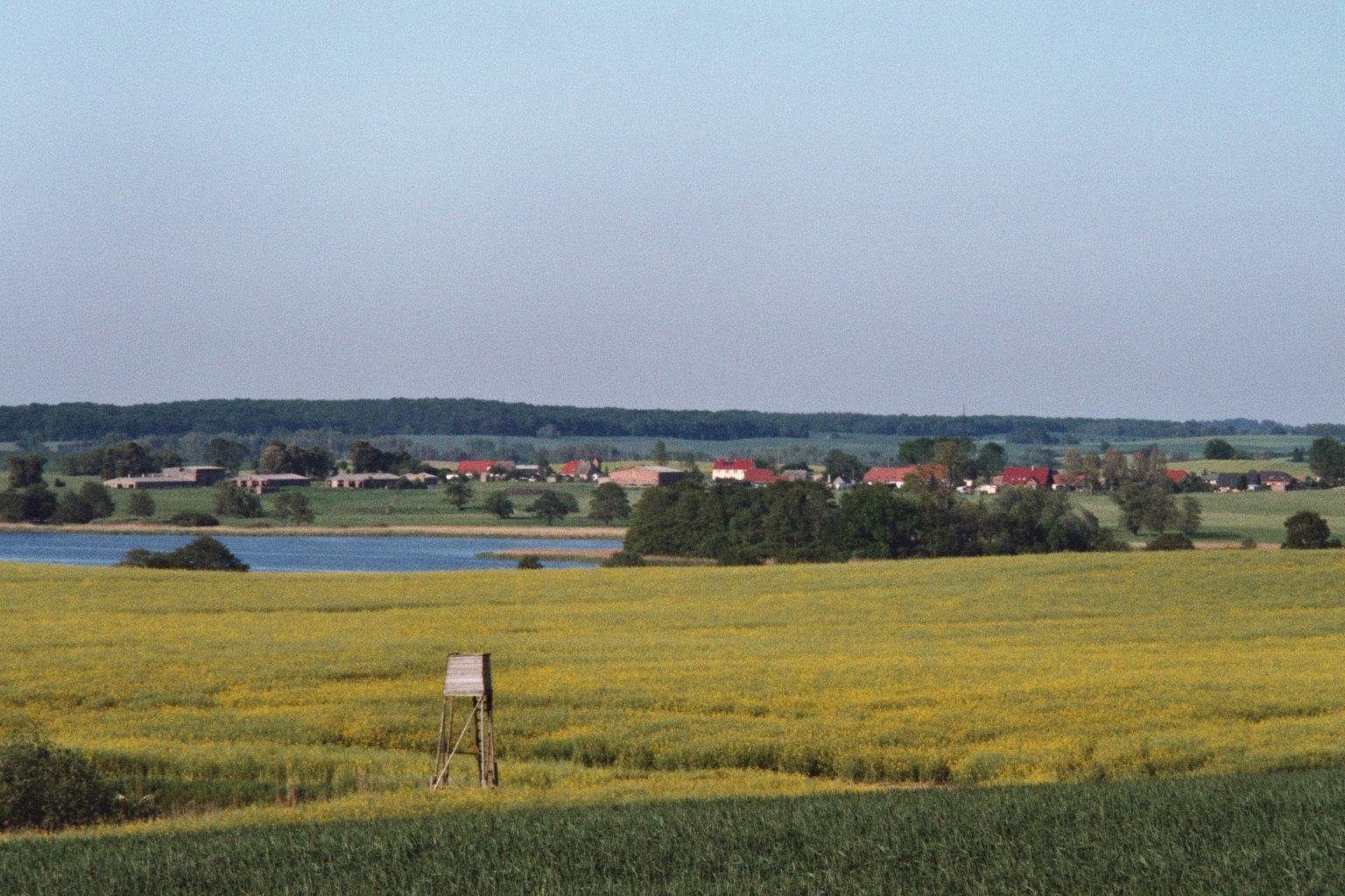 Der Große Stadtsee mit Werder, einem Ortsteil von Penzlin (Landkreis Müritz, Mecklenburg).